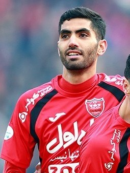 مسابقه پرسپولیس و تراکتورسازی - ورزشگاه آزادی